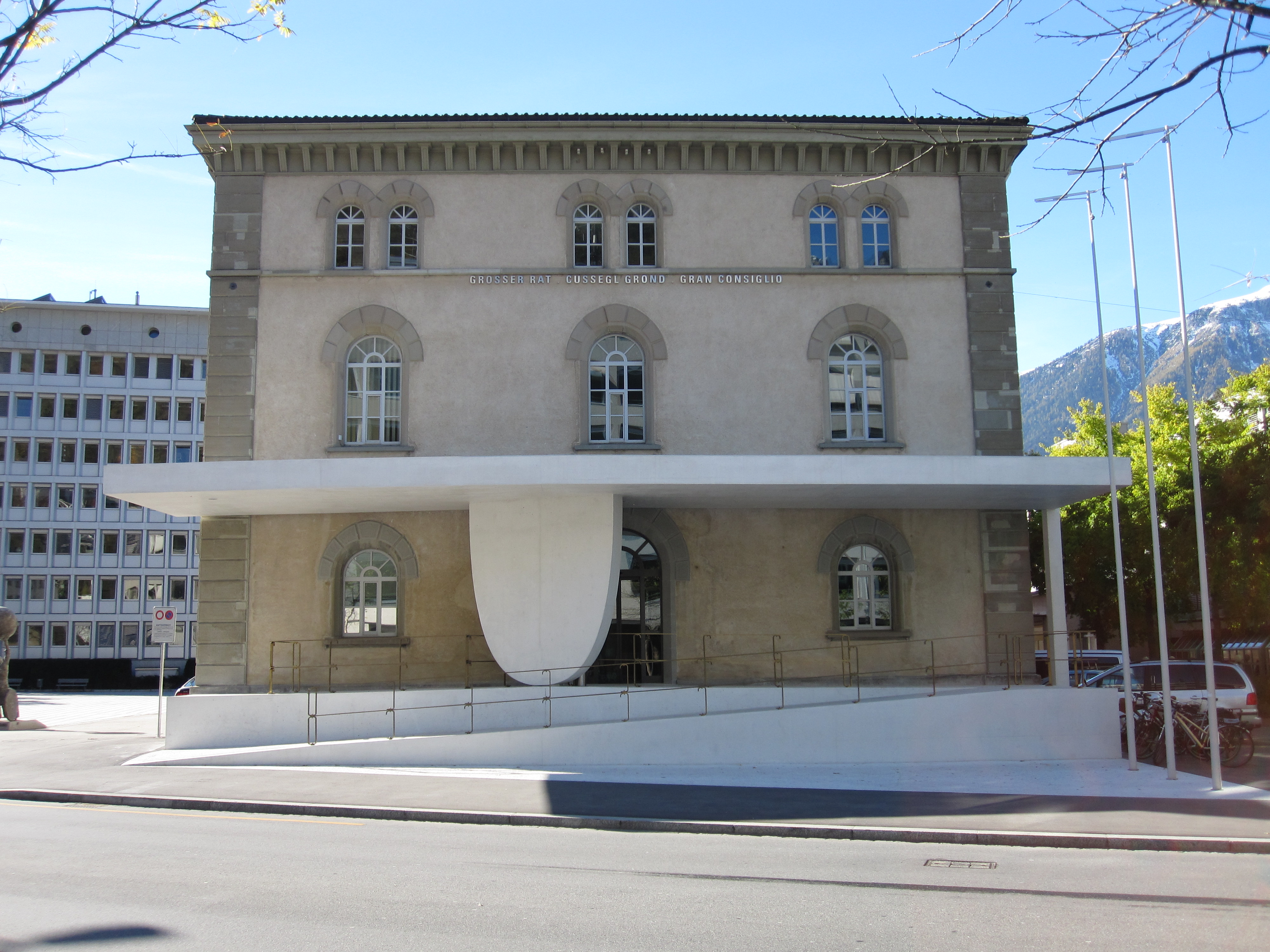 Grossratsgebäude in Chur (Kanton Graubünden, Schweiz)